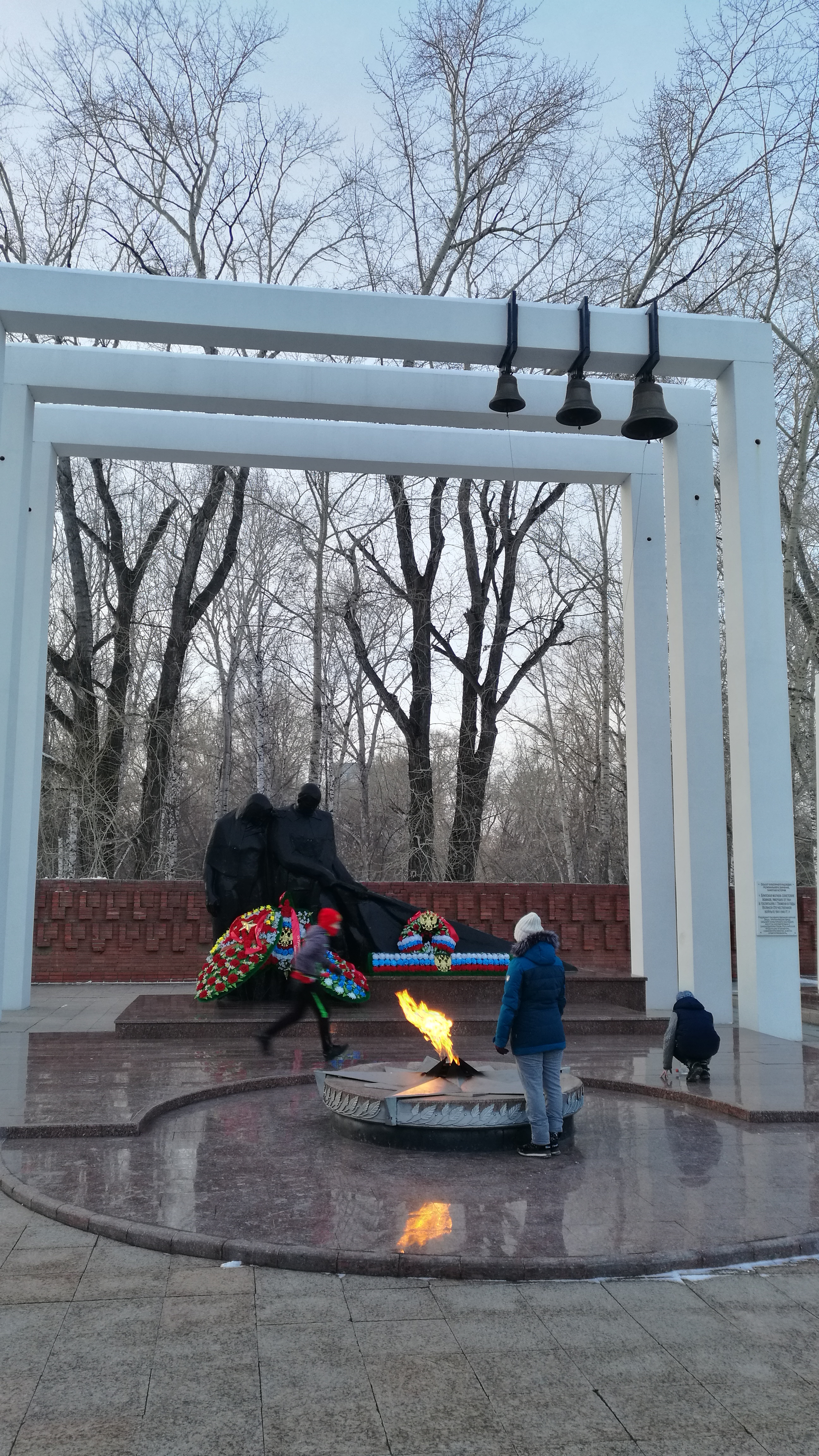 Memorialo de la Dua mondmilito en Placo de Memoro. Tjumeno, Rusio.